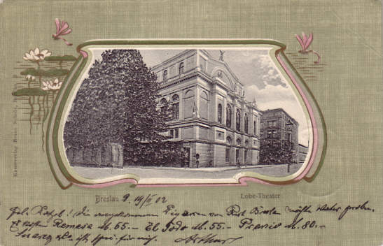 Breslau, Lobe-Theater, Ansichtskarte, gesendet 1902. Kunstverlag Benno Schulz, Breslau.